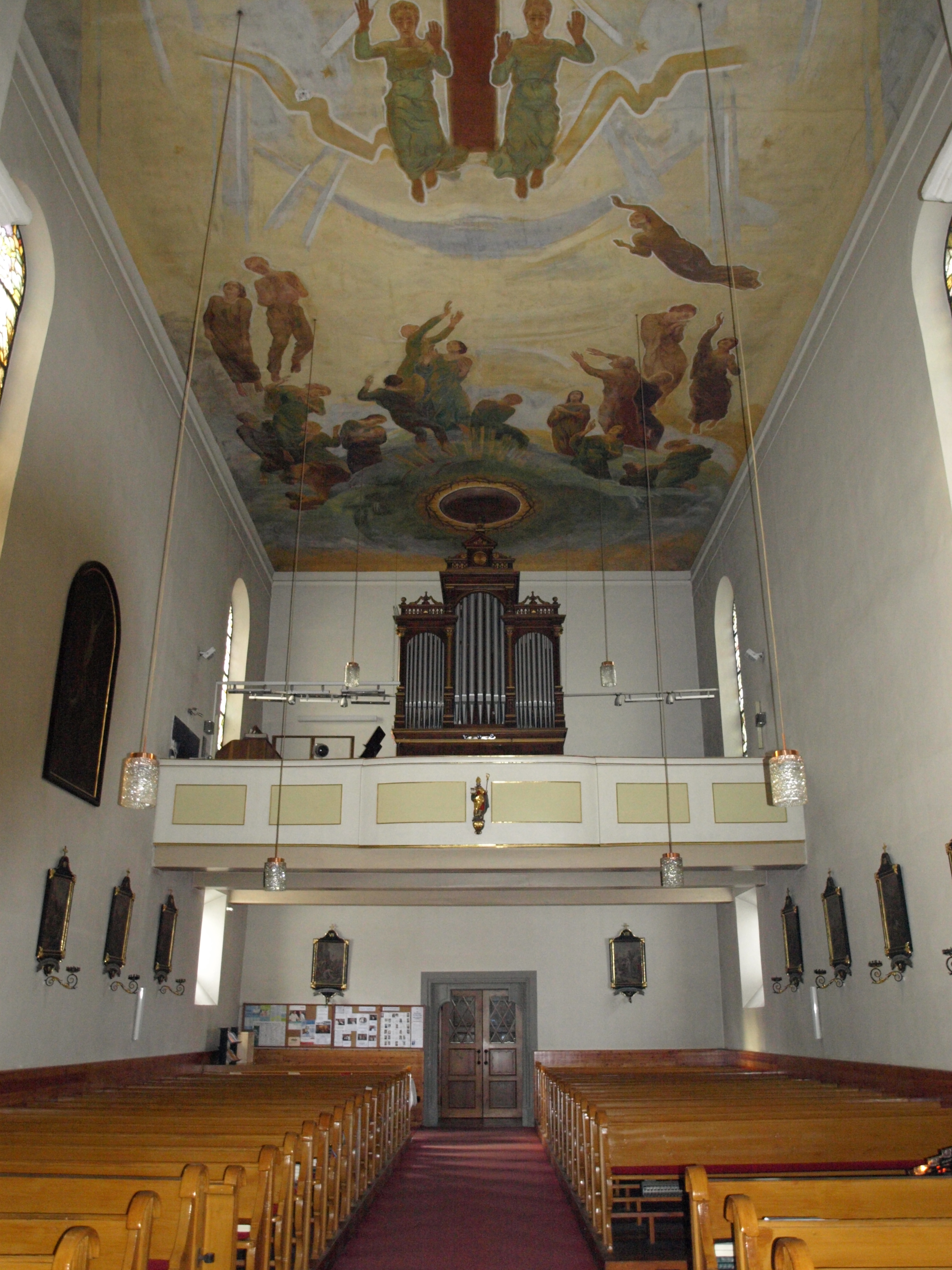 Kath. Pfarrkirche hl. Wolfgang